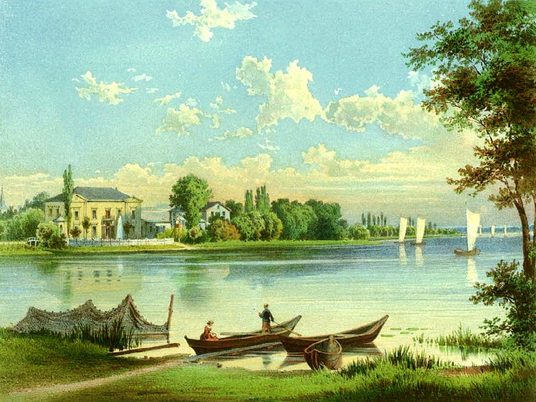 Gut Nieder Neuendorf, Kreis Ost-Havelland, Provinz Brandenburg